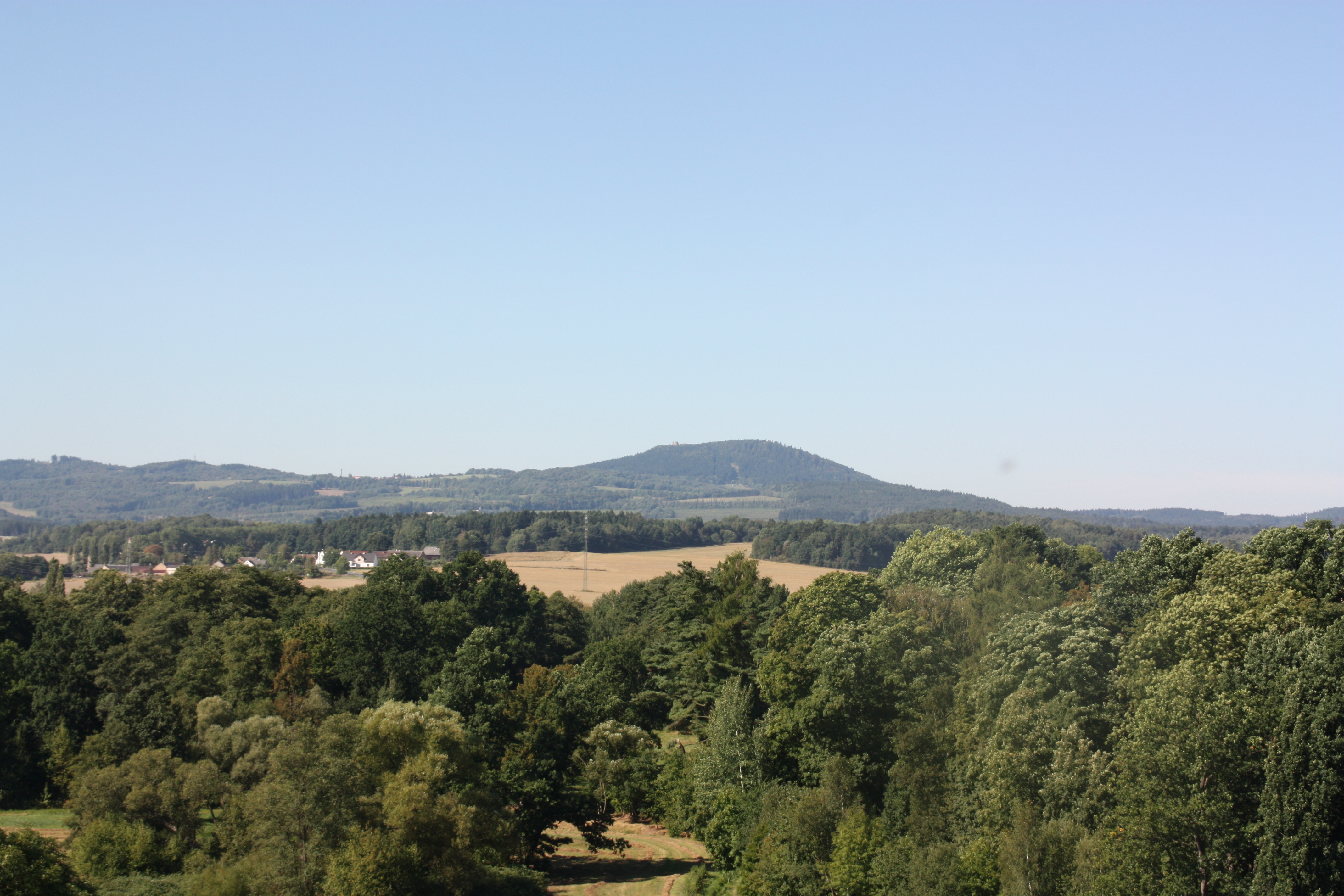 Burg Přimda, Westböhmen, Tschechische Republik. Blick vom Bergfried der Burg Bor u Tachova zur Burg Přimda mit Weitwinkel.